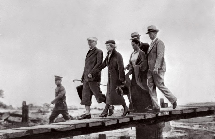 L'arrivée de Trotsky au Mexique. Derrière sa femme Natalia, Frida Kahlo.